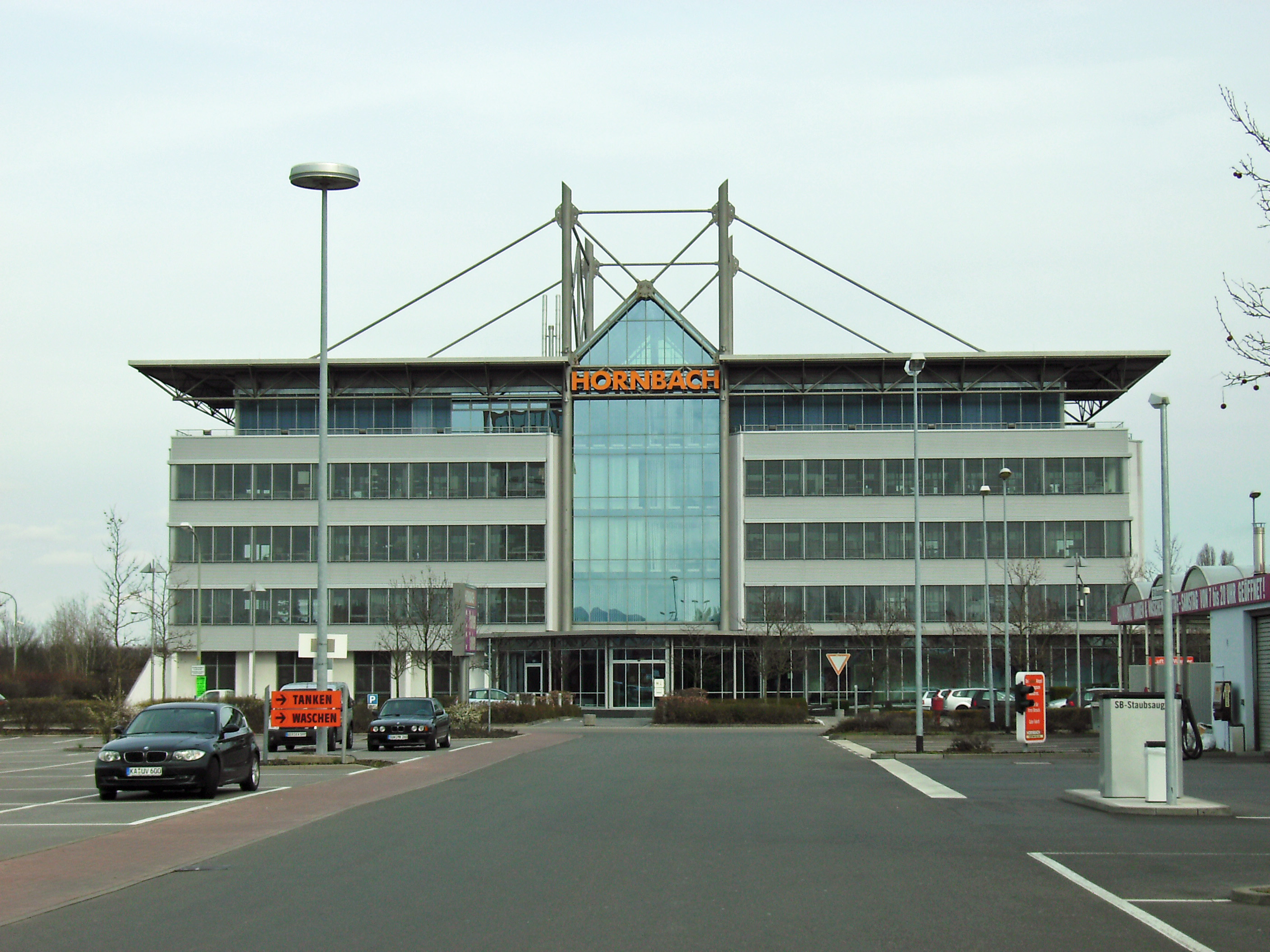 Hornbach: zentrales Verwaltungsgebäude in Bornheim (Pfalz)